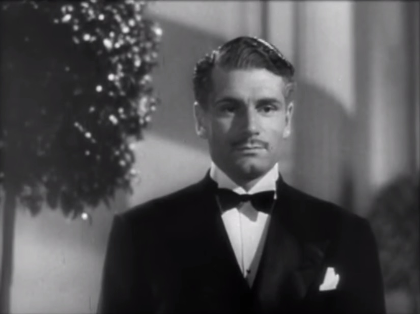 El actor británico Laurence Olivier en la película Rebeca.